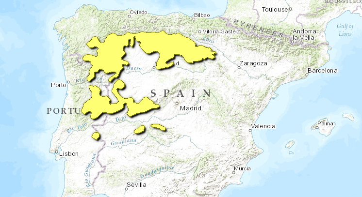 Mappa Ecoregione PA1216 - Foreste montane della penisola iberica nord-occidentale